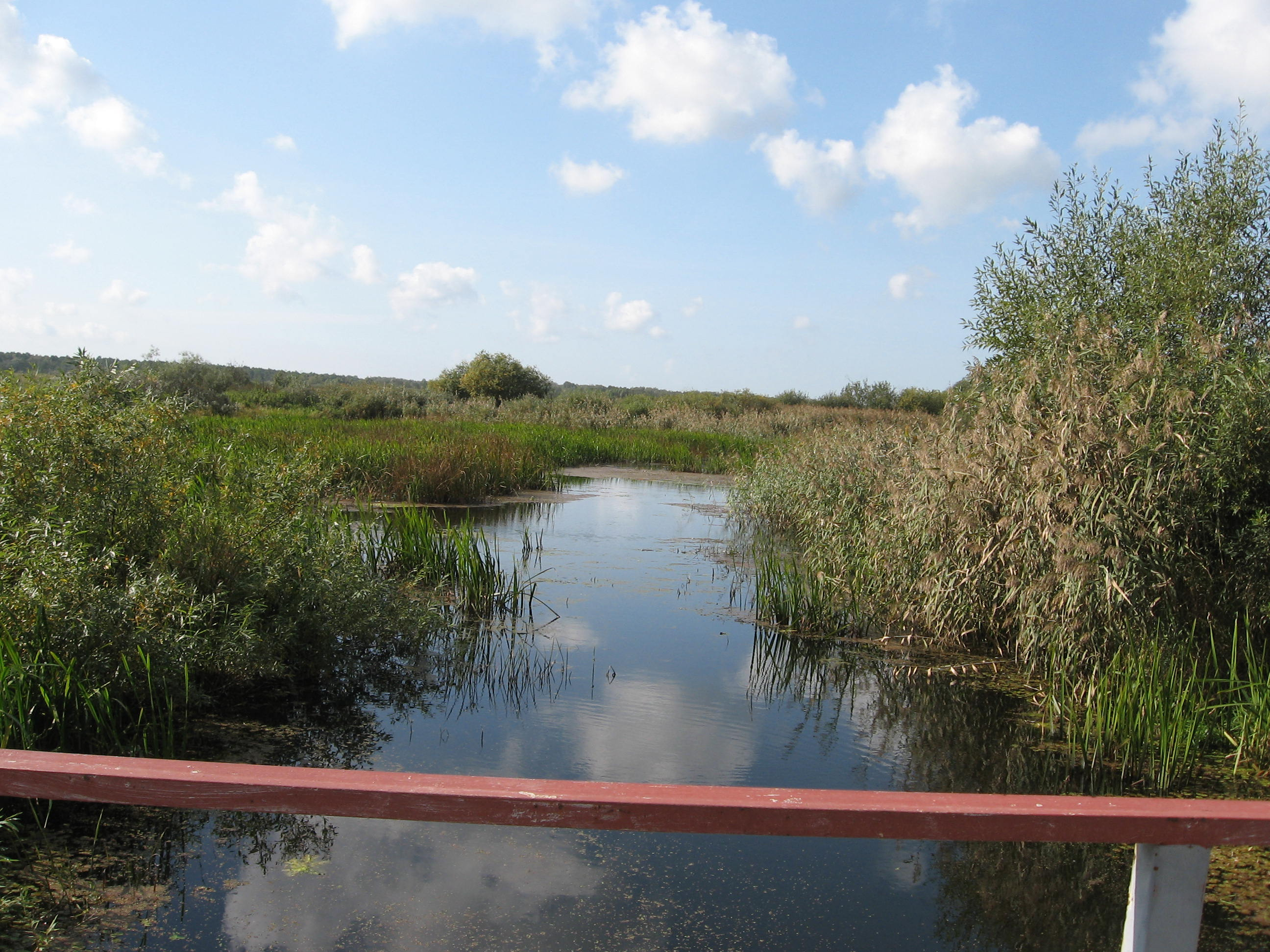 Leitės upė netoli Paleičių kaimo